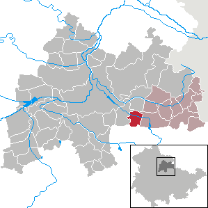 Kleinbrembach in Thuringia - District Sömmerda